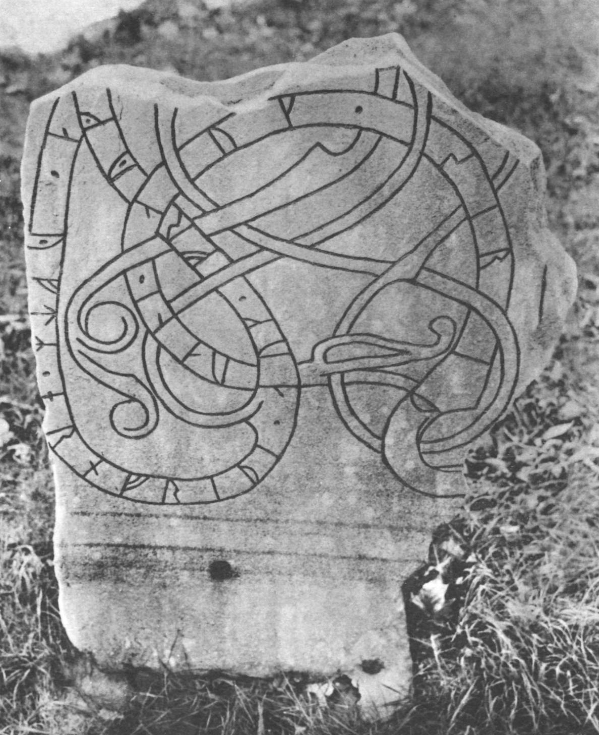 Sida A av runstensfragment U 851